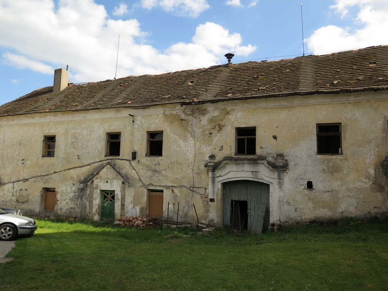 Zámek Omlenička, Omlenička 1, Omlenička.